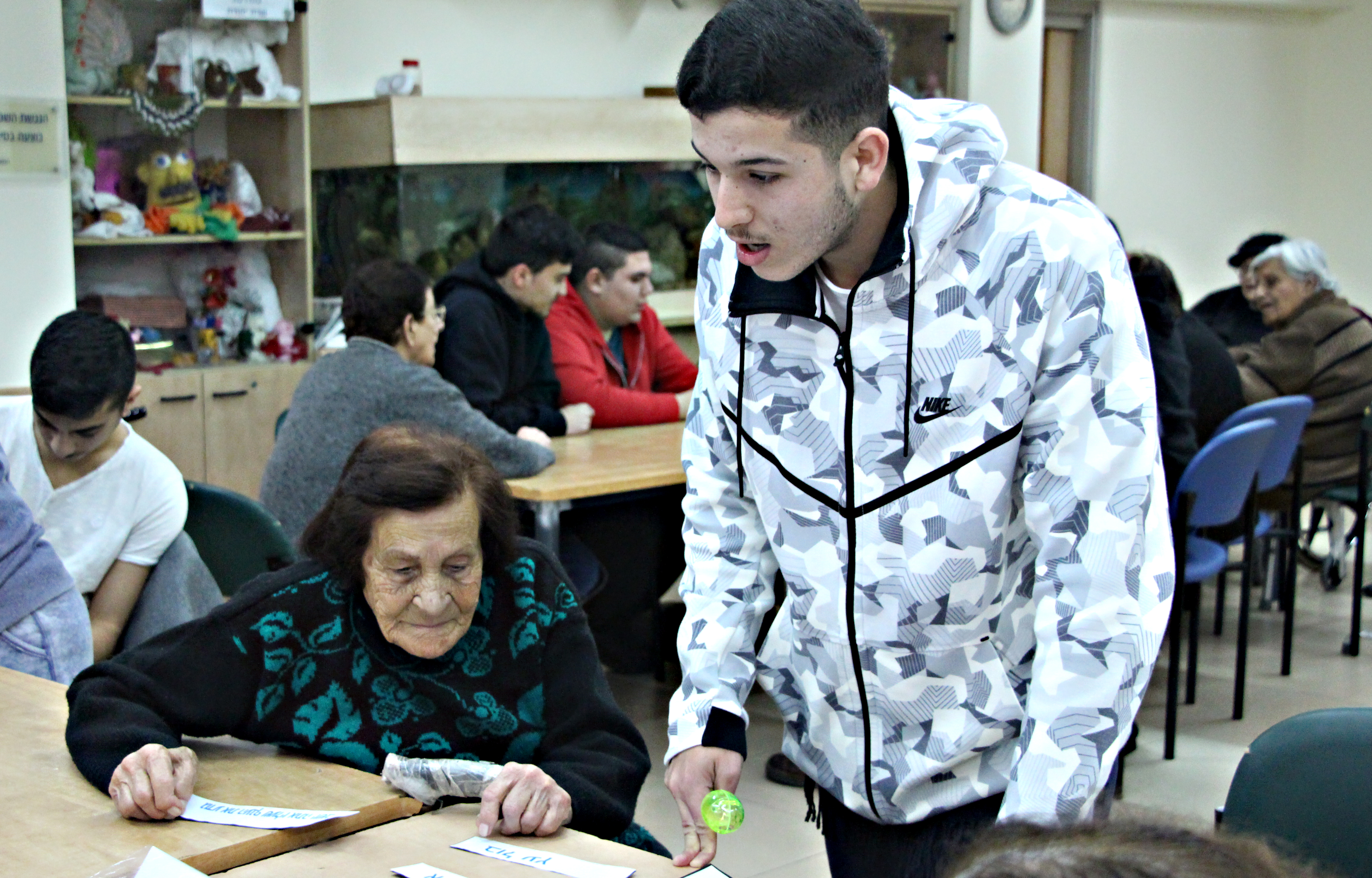 התנדבות תיכון רוטברג